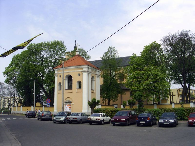 Międzyrzec Podlaski